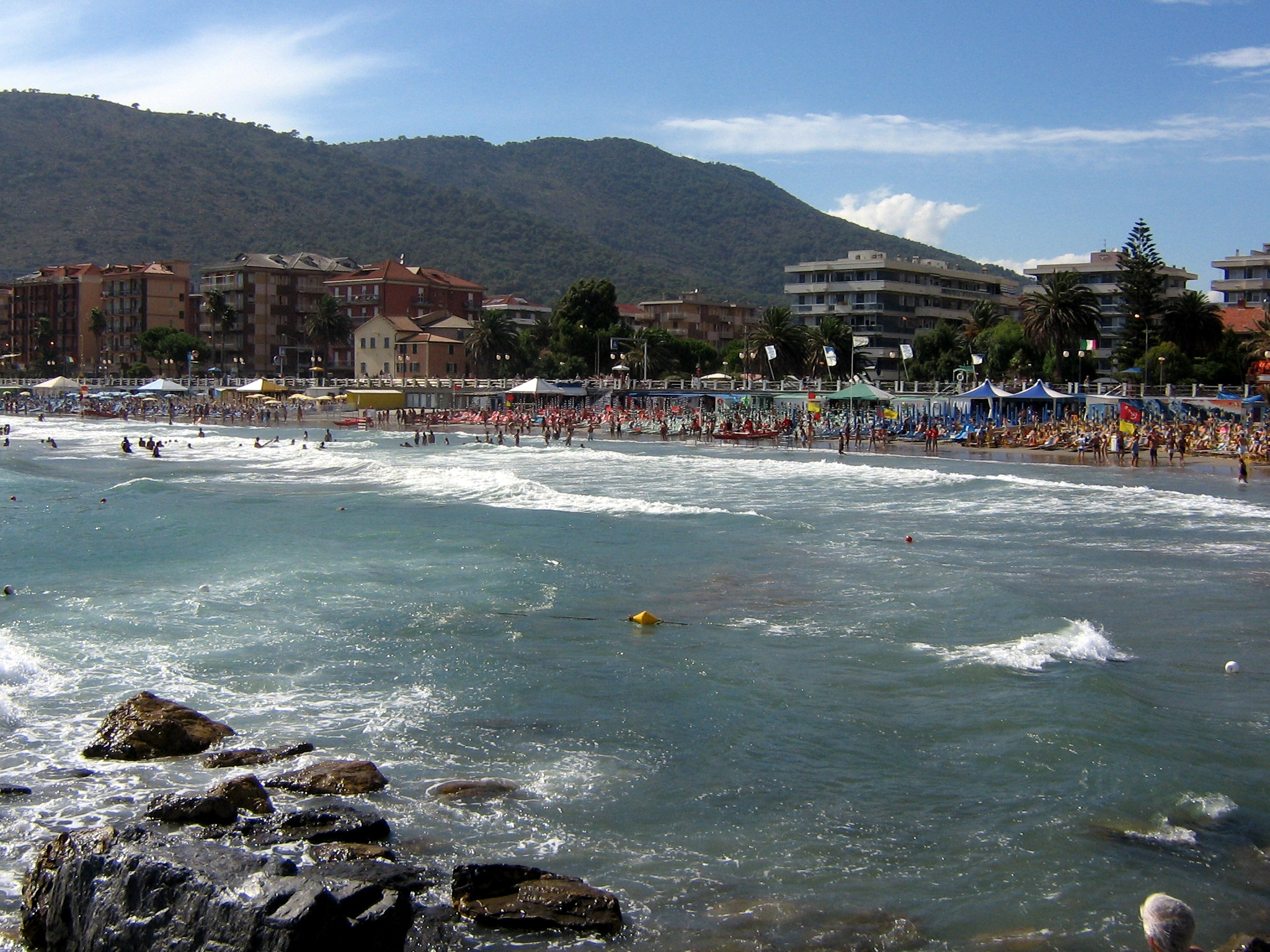 Il lungomare di Andora